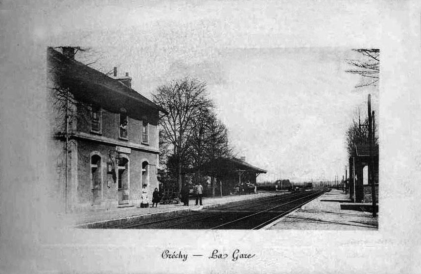 Carte postale ancienne de la gare de Créchy dans l'Allier